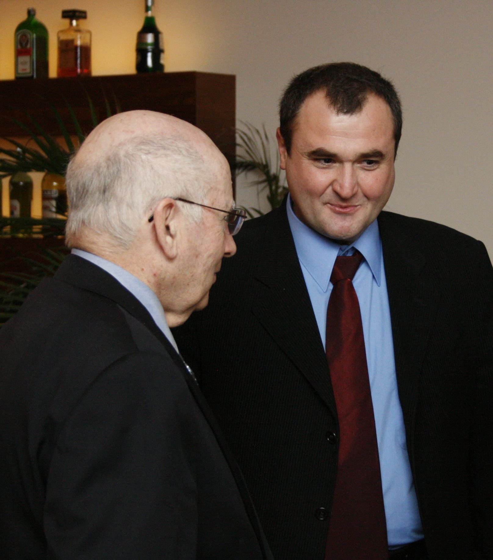 Позициониране на българския бизнес и култура на световните пазари